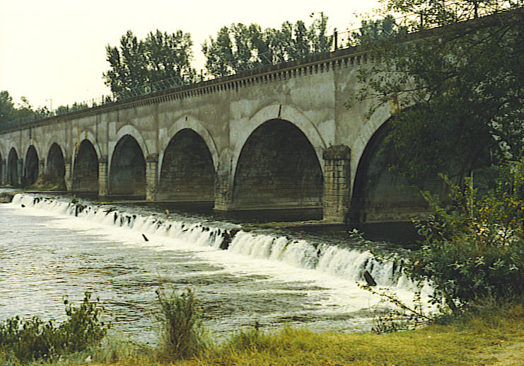 self made